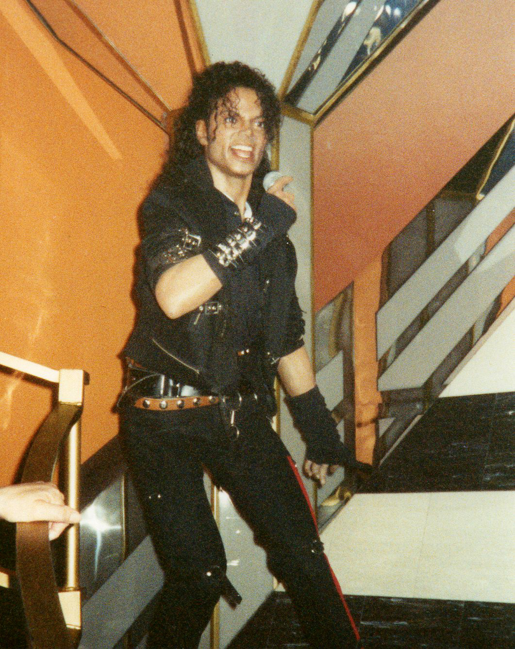 Statue de cire du chanteur Michael Jackson au Musée Tussaud de Londres en 1992.